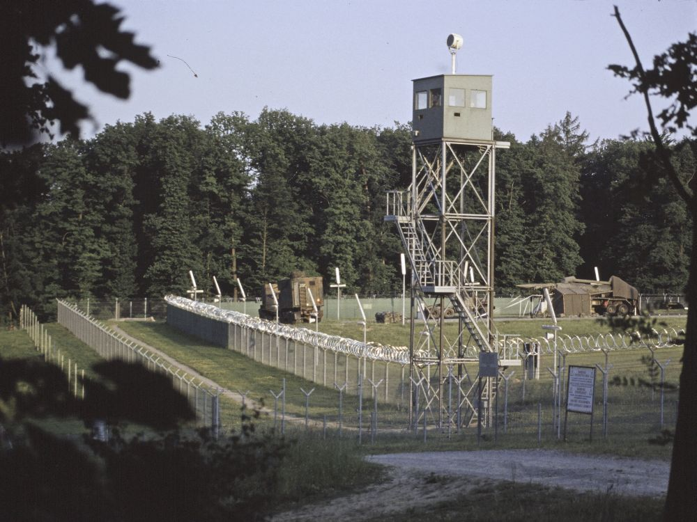 Der US-Militärstützpunkt auf der Heilbronner Waldheide im Juni 1982